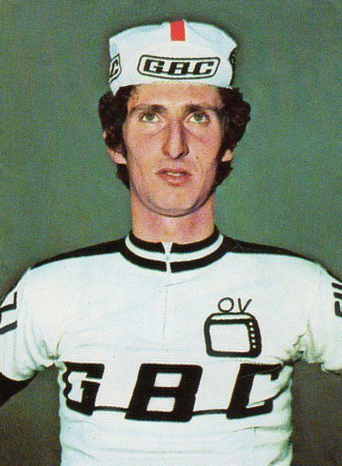 FIGURINA PANINI CAMPIONI DELLO SPORT ANNO 1973/74 N. 167 CICLISMO FRANCIONI